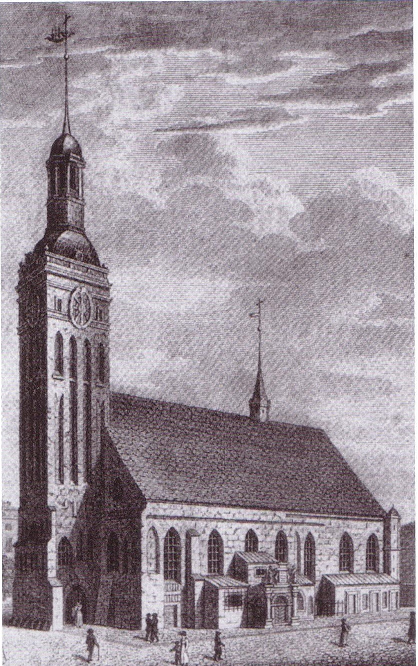 Kupferstich der alten Altstädtischen Kirche in Königsberg, aus der Kuperstichsammlung der Albertus-Universität Königsberg, Verlust im Zweiten Weltkrieg